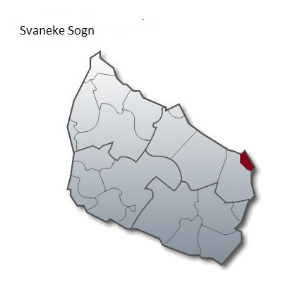 Svaneke sogn